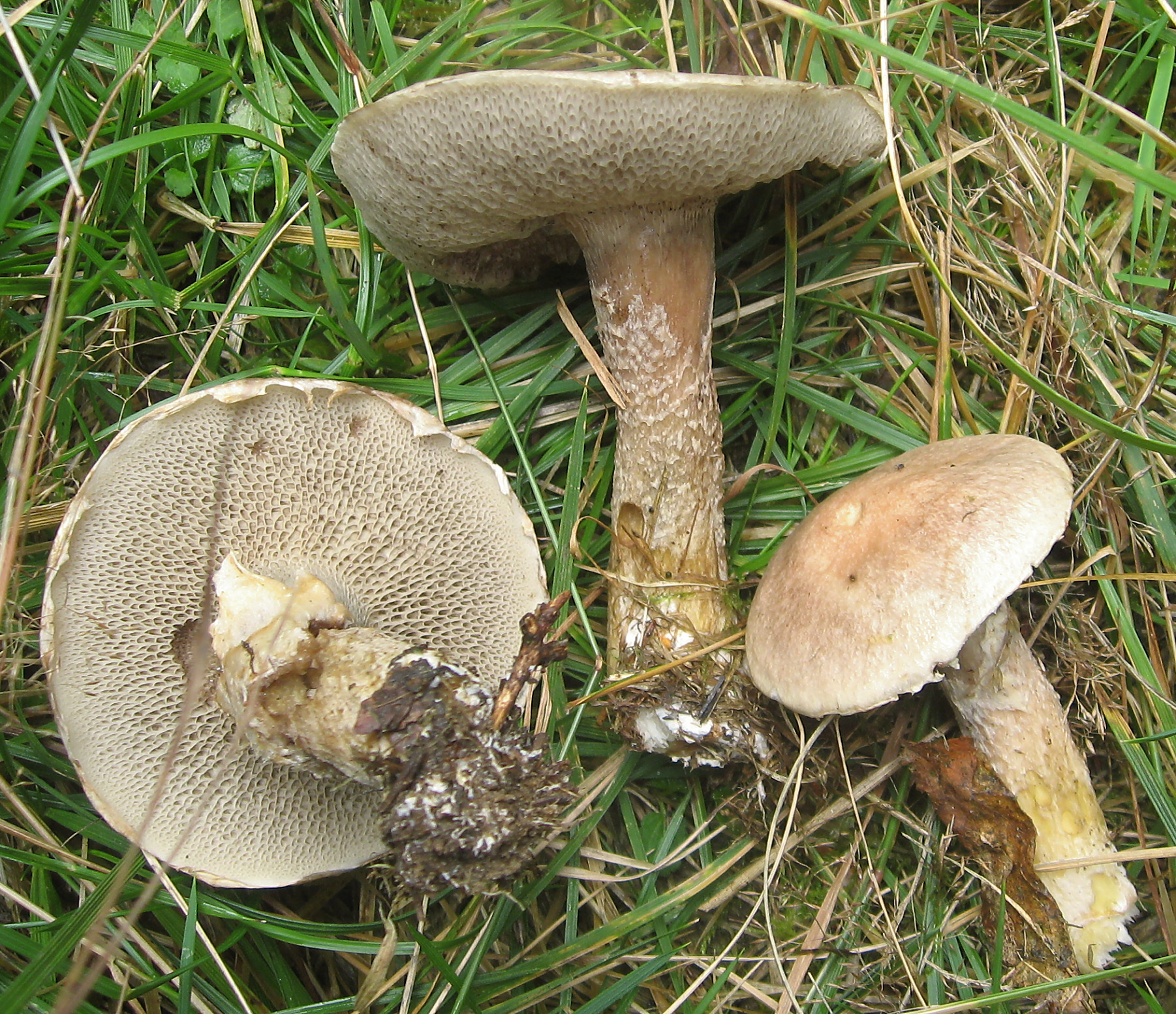 Klouzek slizký